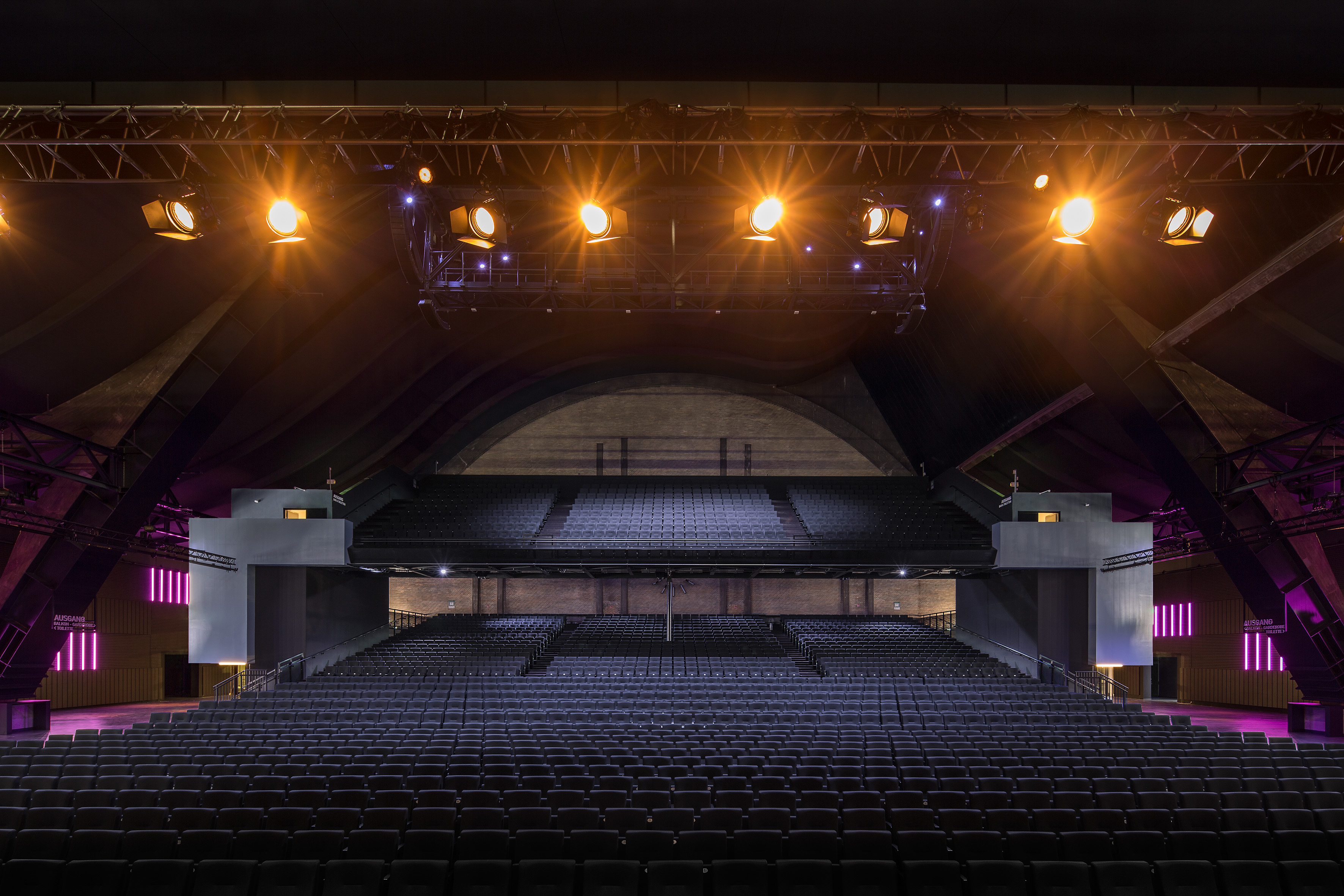 Mehr! Theater am Großmarkt, Blick in den bestuhlten Saal